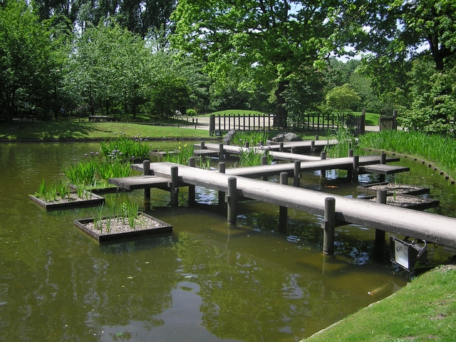 foto Mike, 22 mei 2005